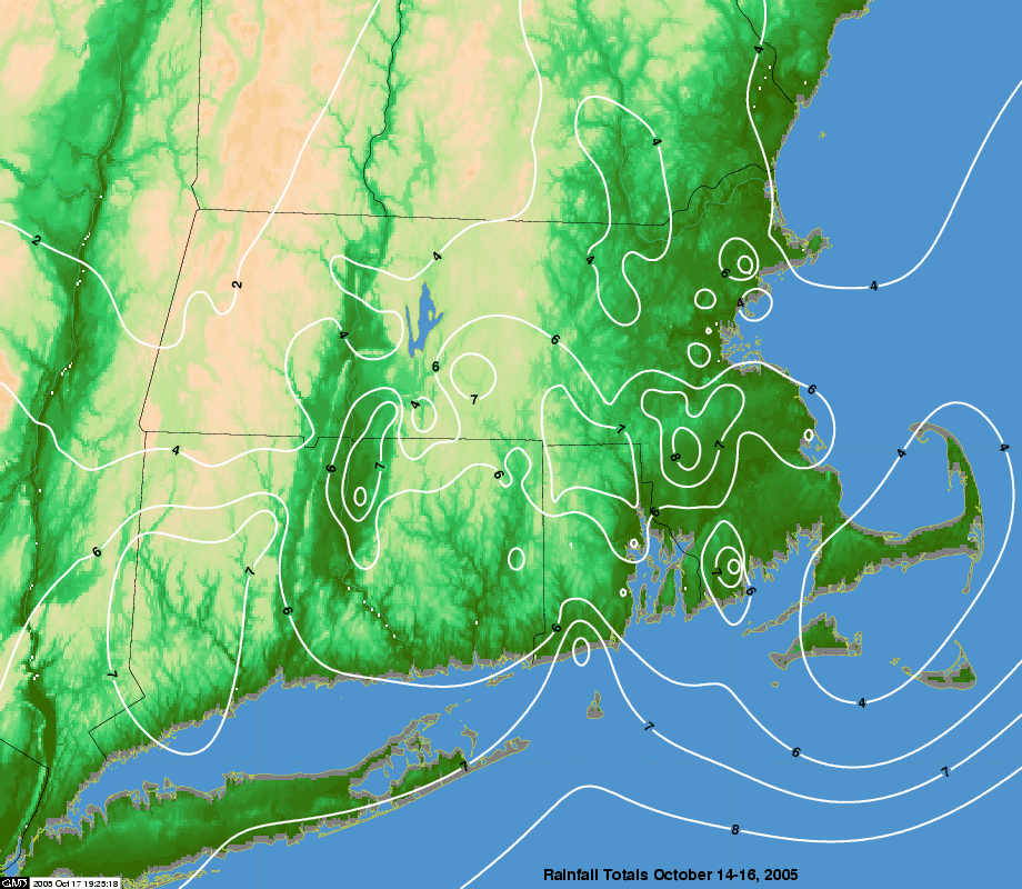 From [1].